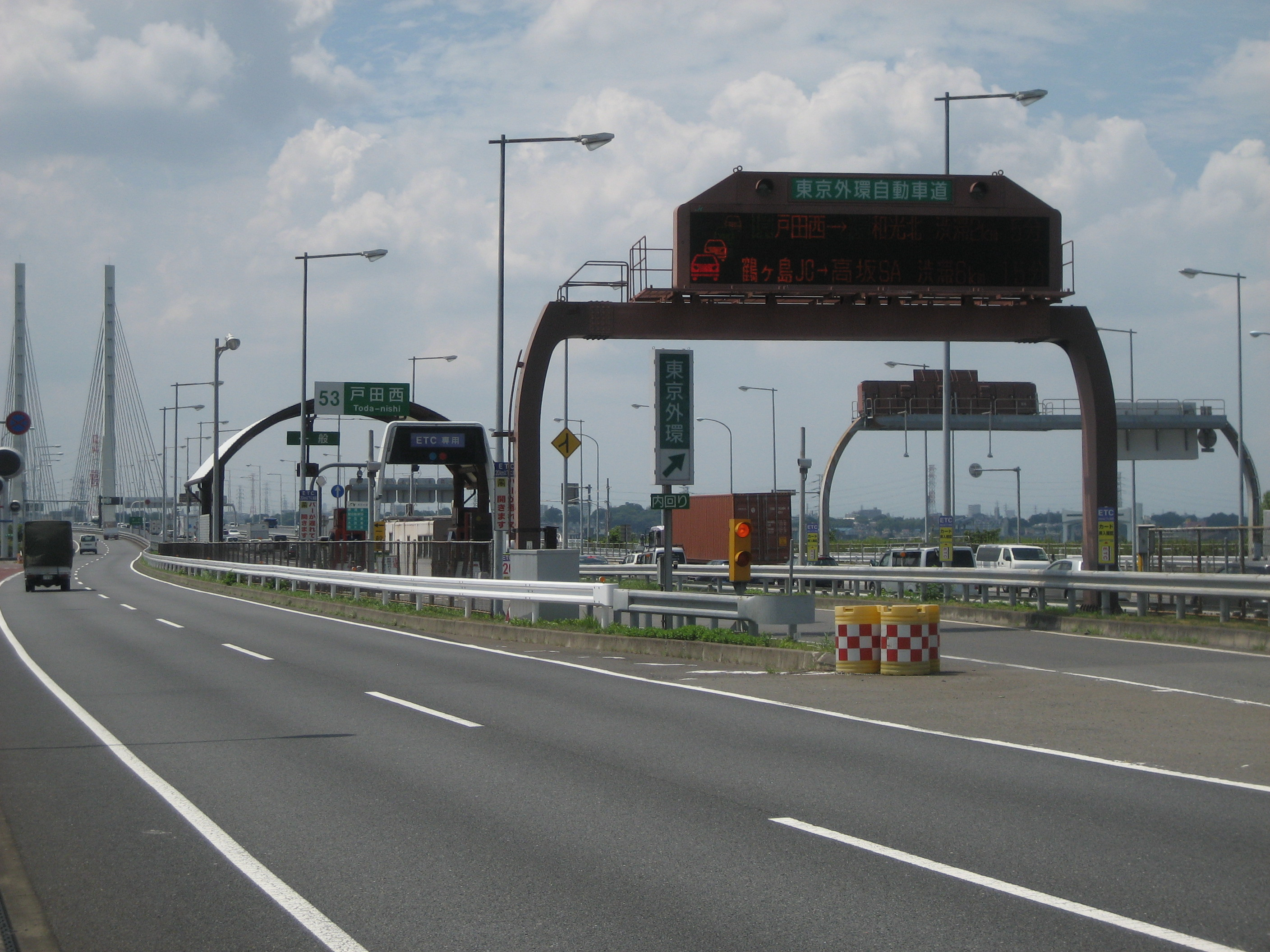 東京外環自動車道内回り戸田西入口